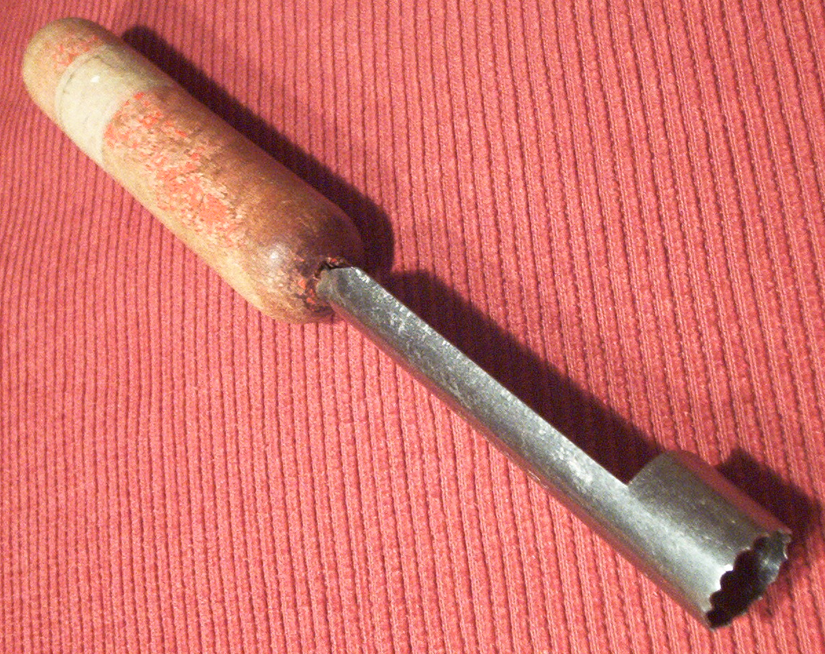 foto van een appelboor. Zelfgemaakte foto voor het publiek domein. Martink